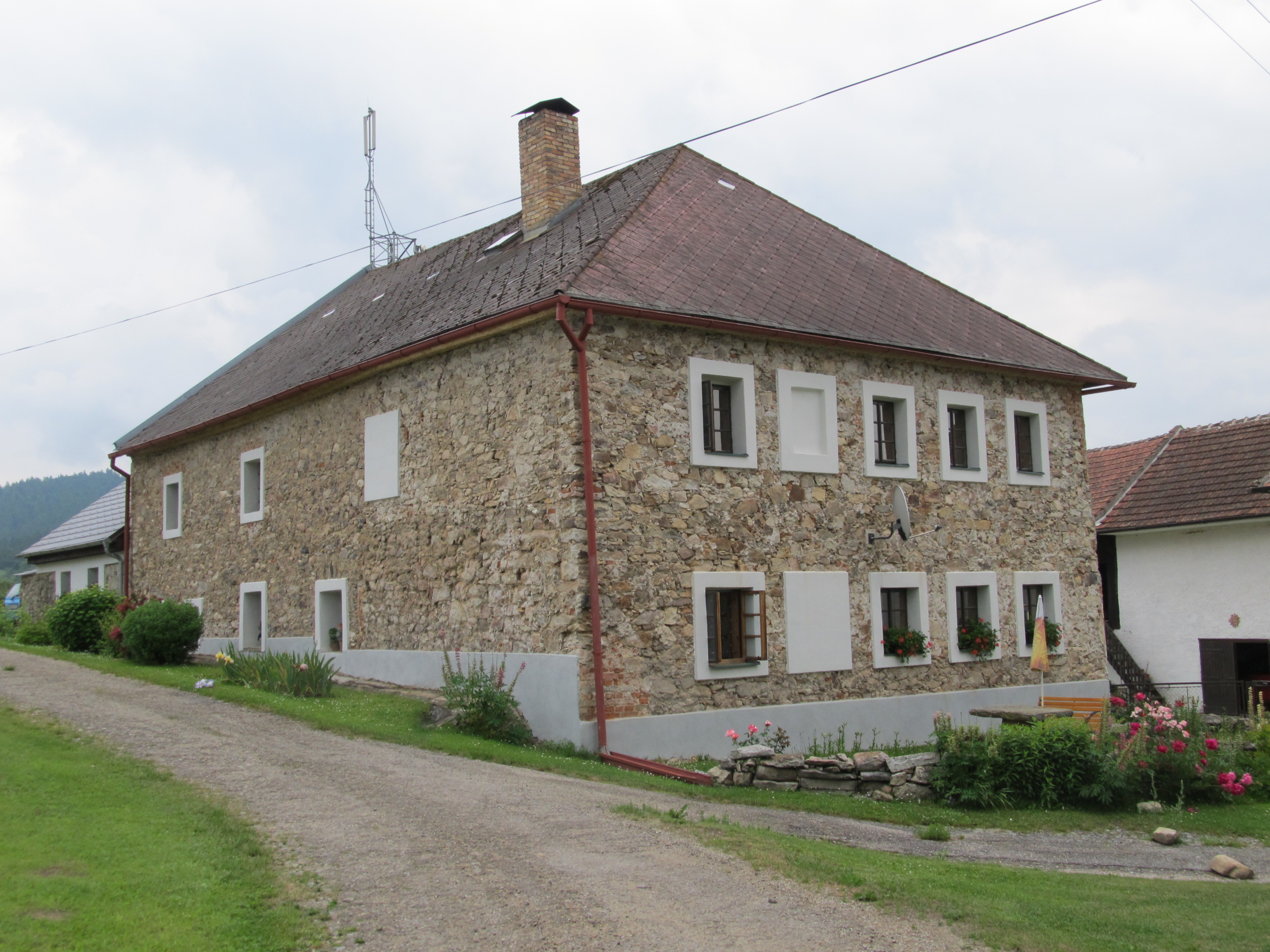 Záhvozdí - statek